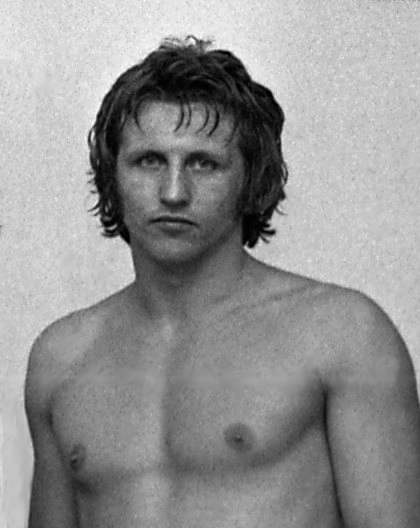 Hegedűs Csaba olimpiai bajnok birkózó